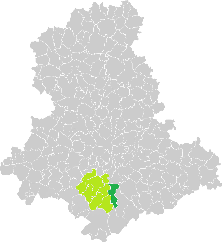 Carte de situation de la commune de Saint-Priest-Ligoure (en vert foncé) dans le votre Canton (en vert clair) sur une carte des communes de la Haute-Vienne